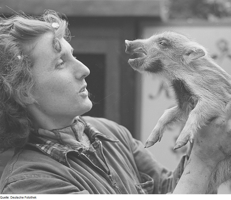 Original image description from the Deutsche Fotothek Tierpflegerin mit einem Ferkel